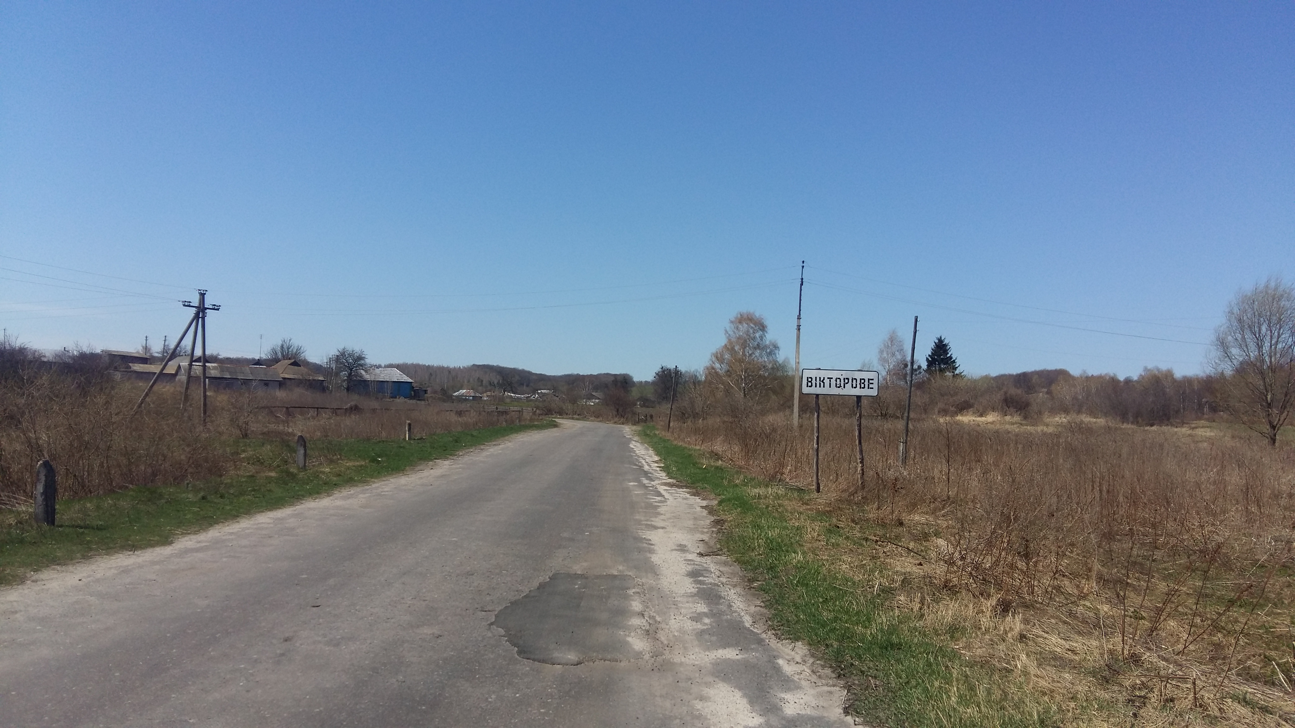 Село Викторово